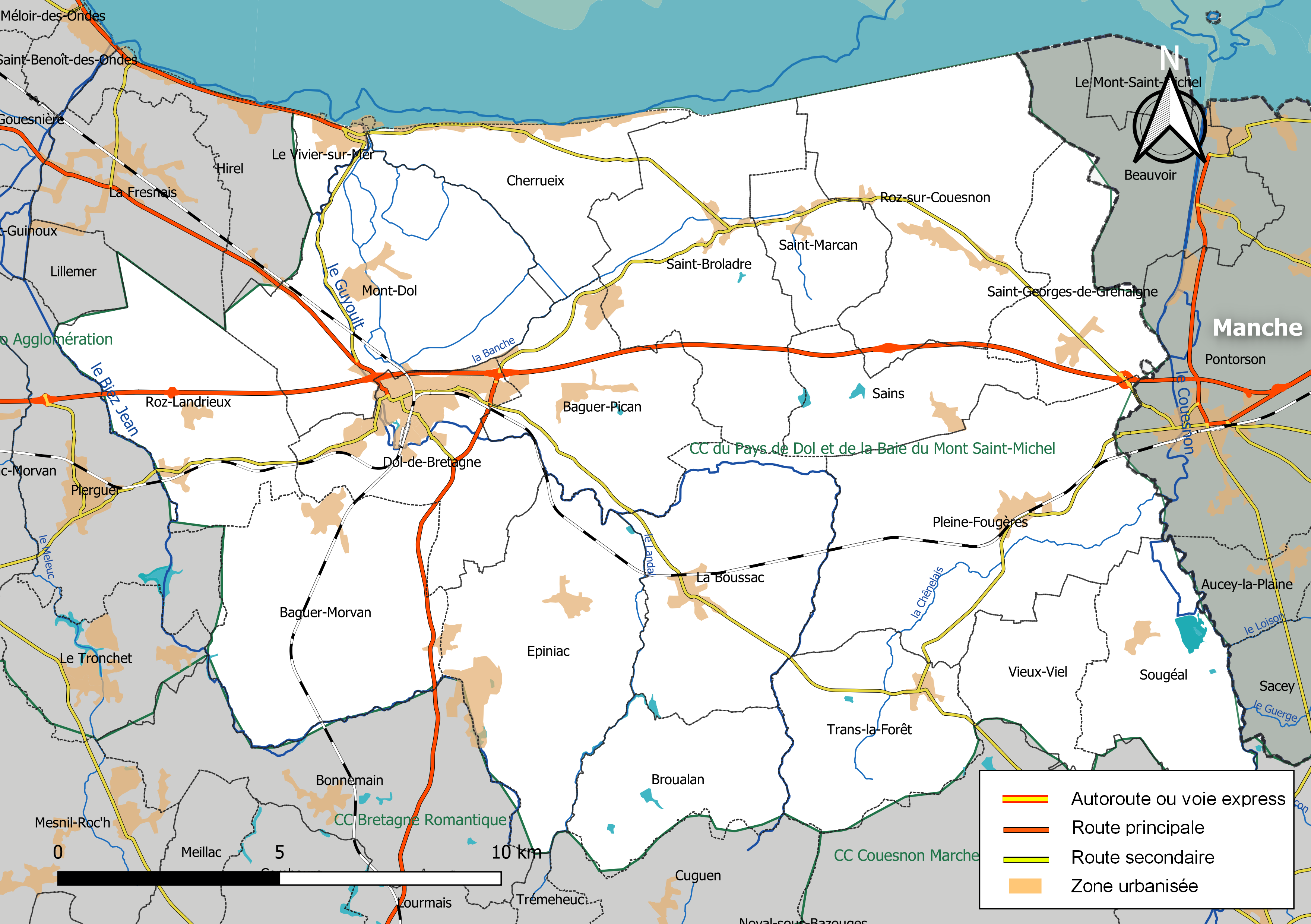 Carte géographique de la Communauté de communes du Pays de Dol et de la Baie du Mont Saint-Michel, département d'Ille-et-Vilaine, France. Composition au 1er janvier 2019.